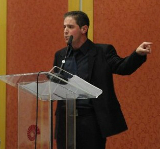 יוני כהן אידוב נואם בגמר אליפות העולם בדיבייט לאוניברסיטאות 2010